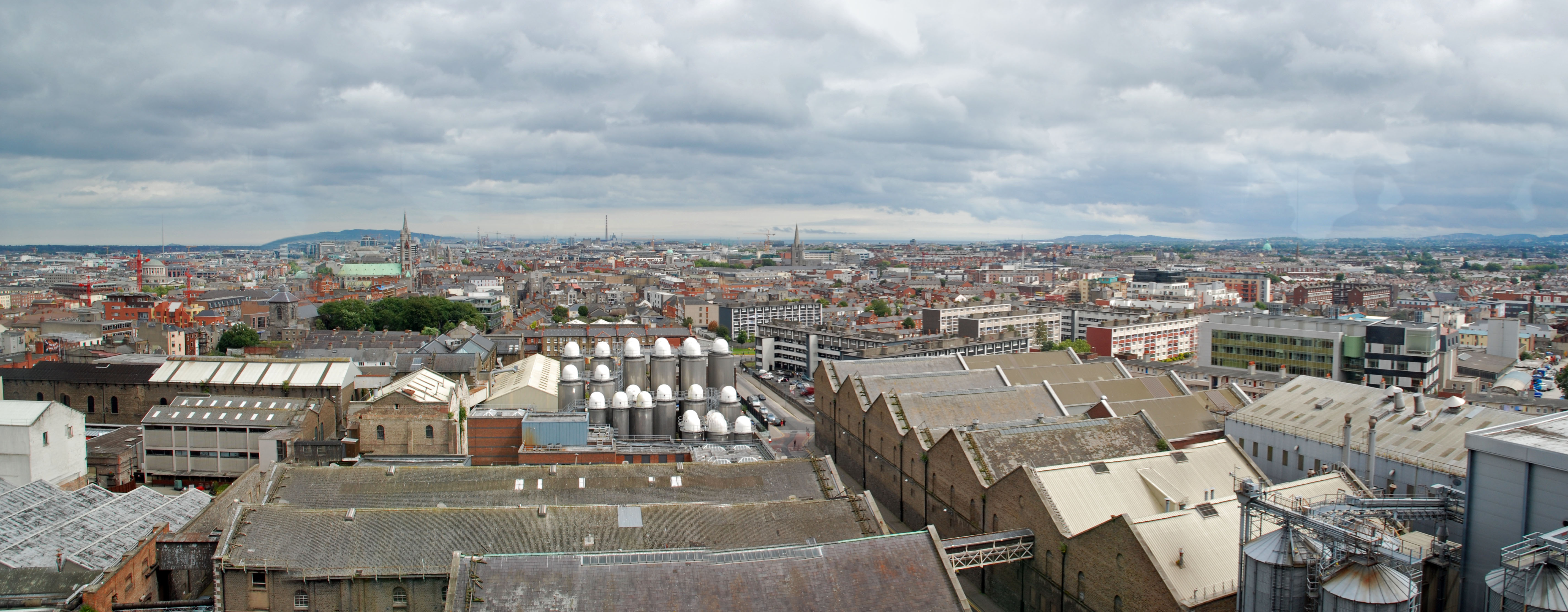 Panoramica de Dublín desde el Museo de la Guiness